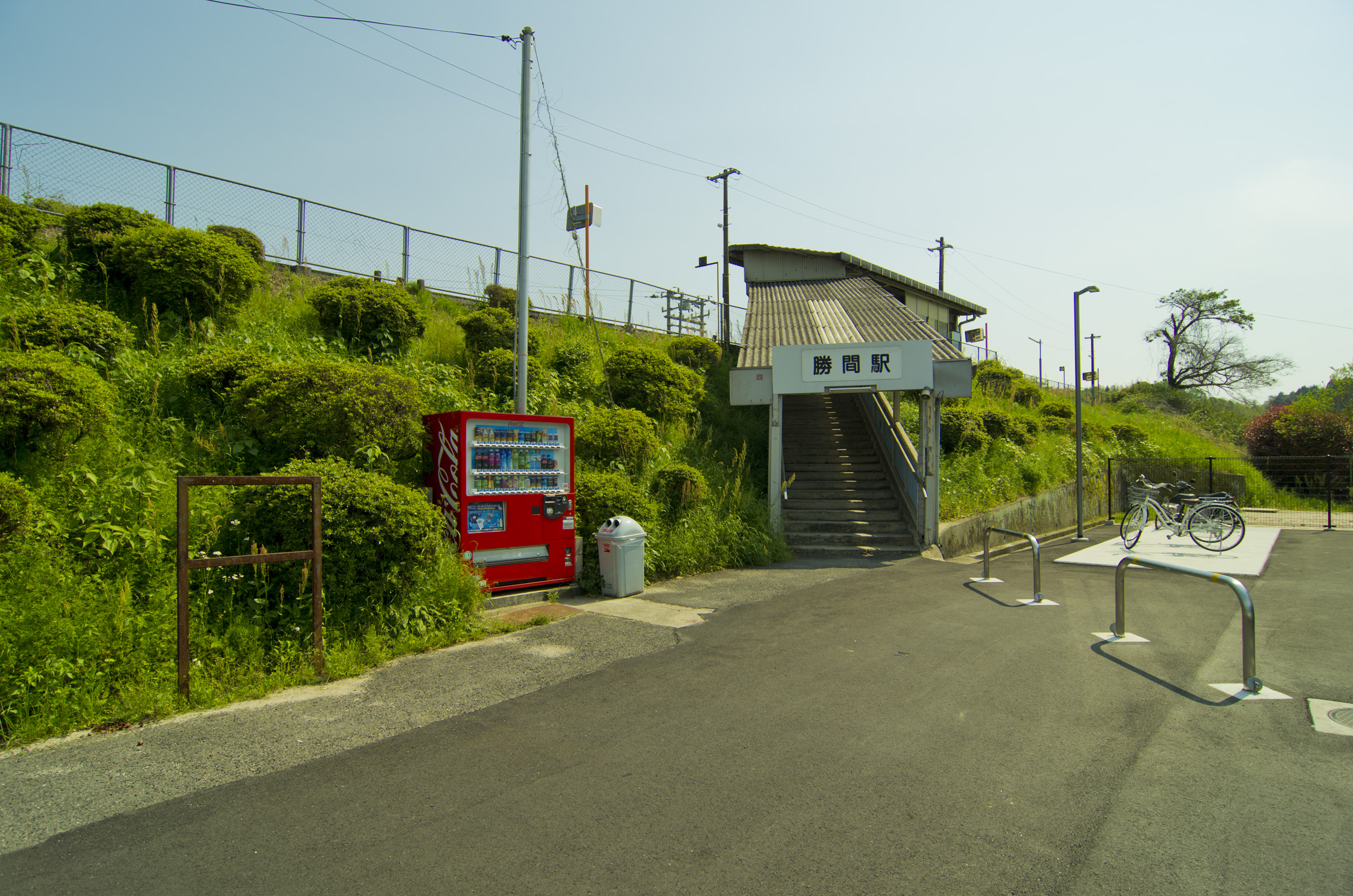 西日本旅客鉄道株式会社岩徳線勝間駅